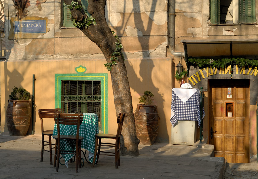 Skadarlia, Belgrade, Serbie